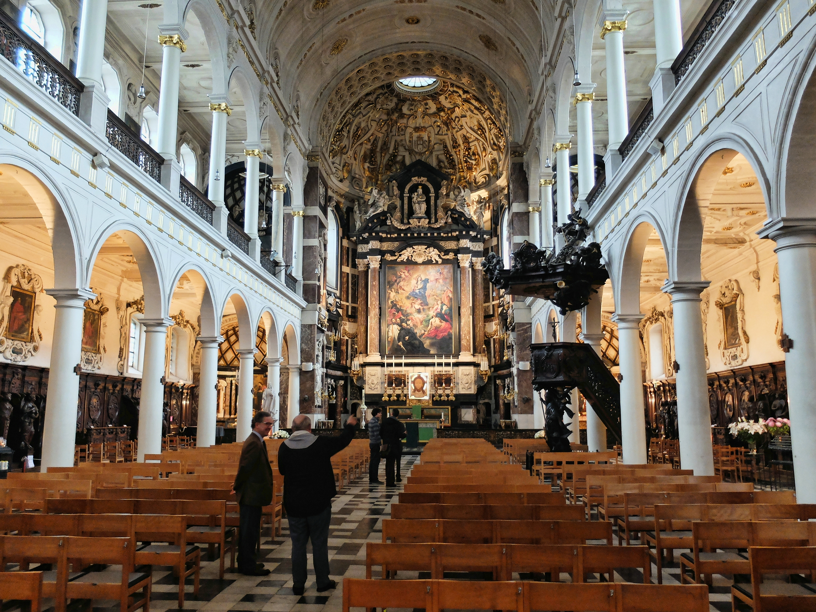 Interieur van de Carolus Borromeuskerk in Antwerpen